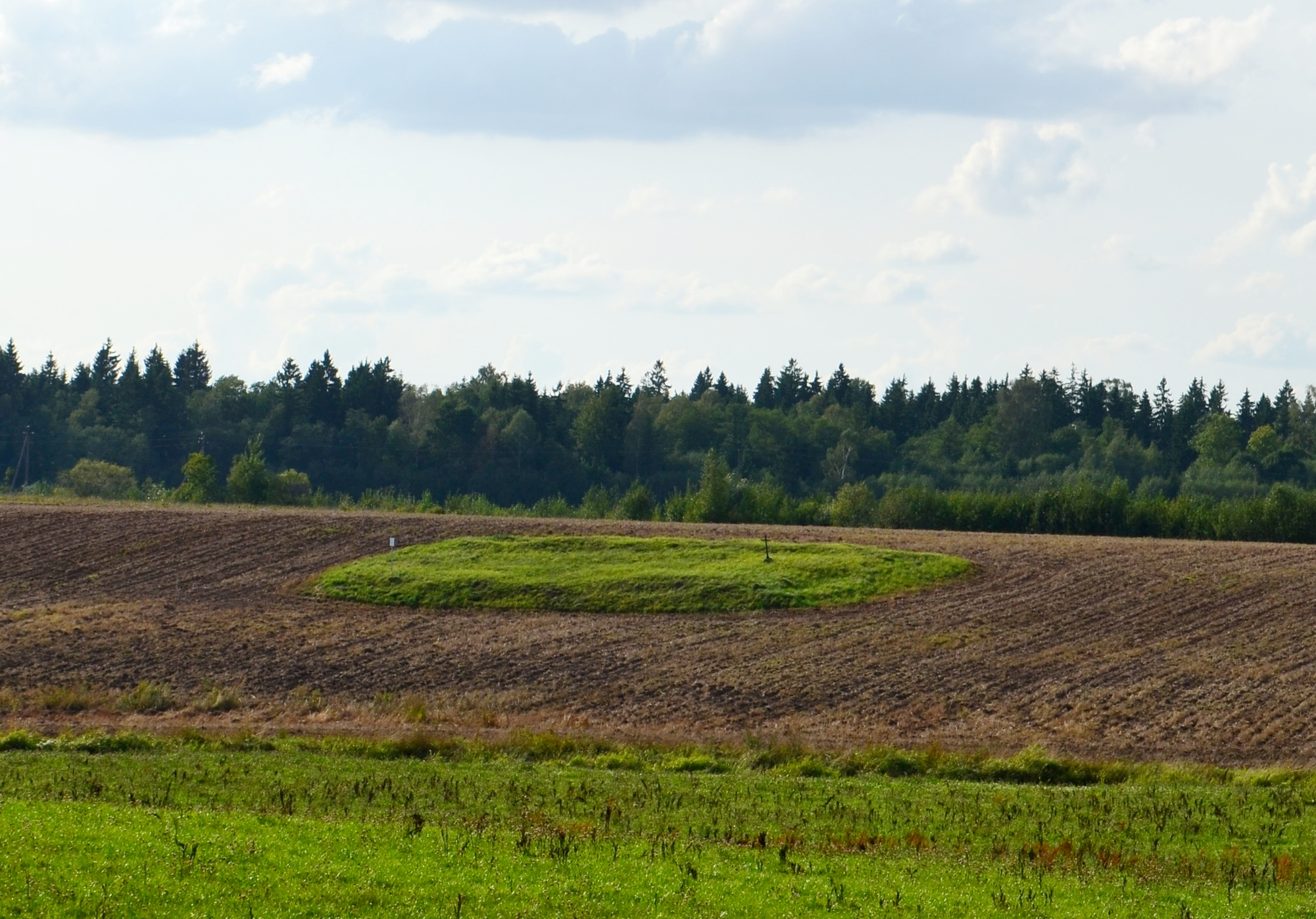 Pagomerčių senosios kapinaitės, Radviliškio raj.